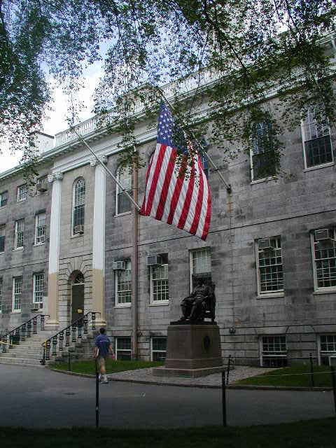 Harvard Yard and John Harvard statue. Taken by: User Heuristics Date: May 14, 2000